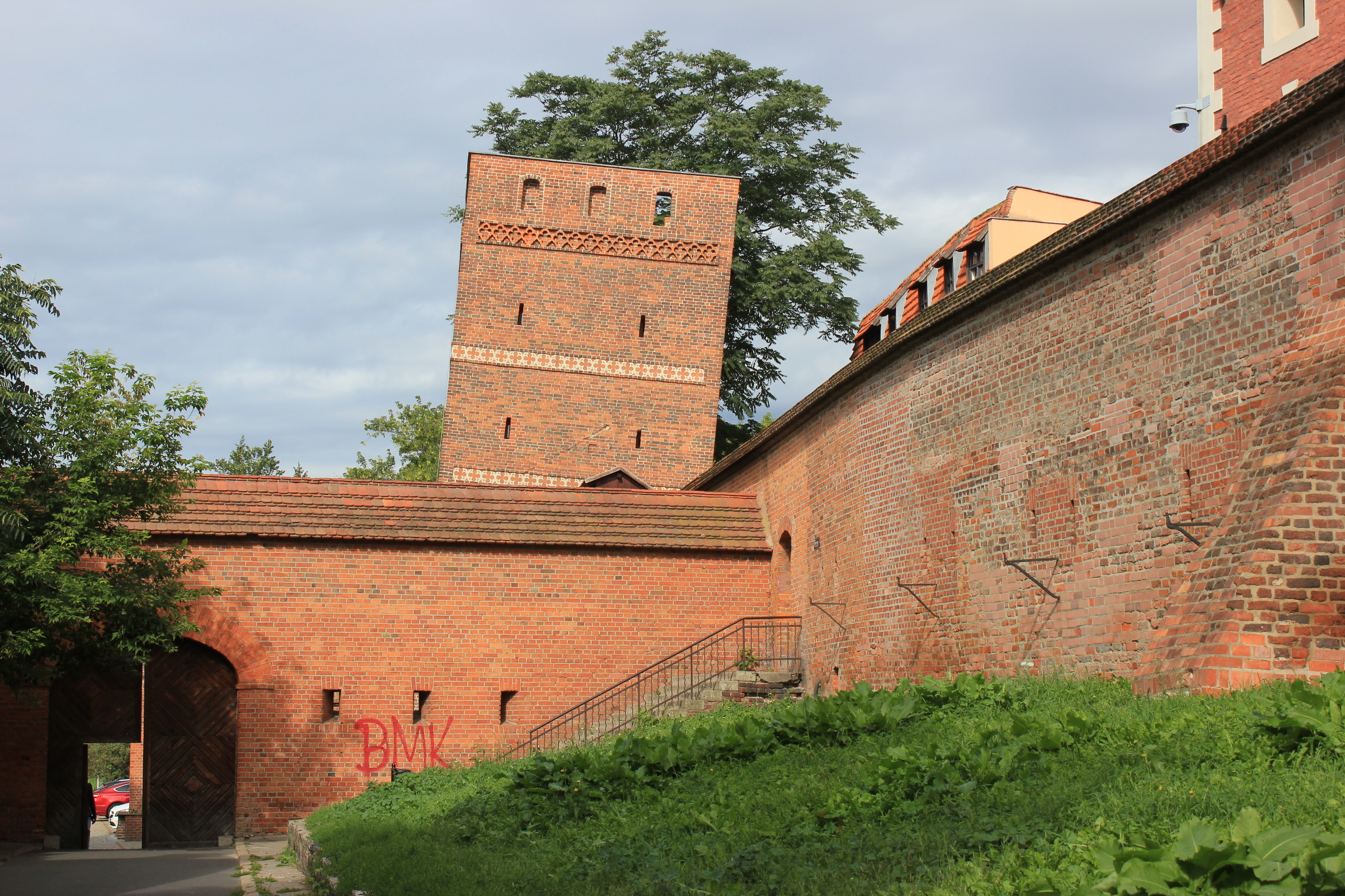 Der Schiefe Turm in Toruń (Thorn), Polen.